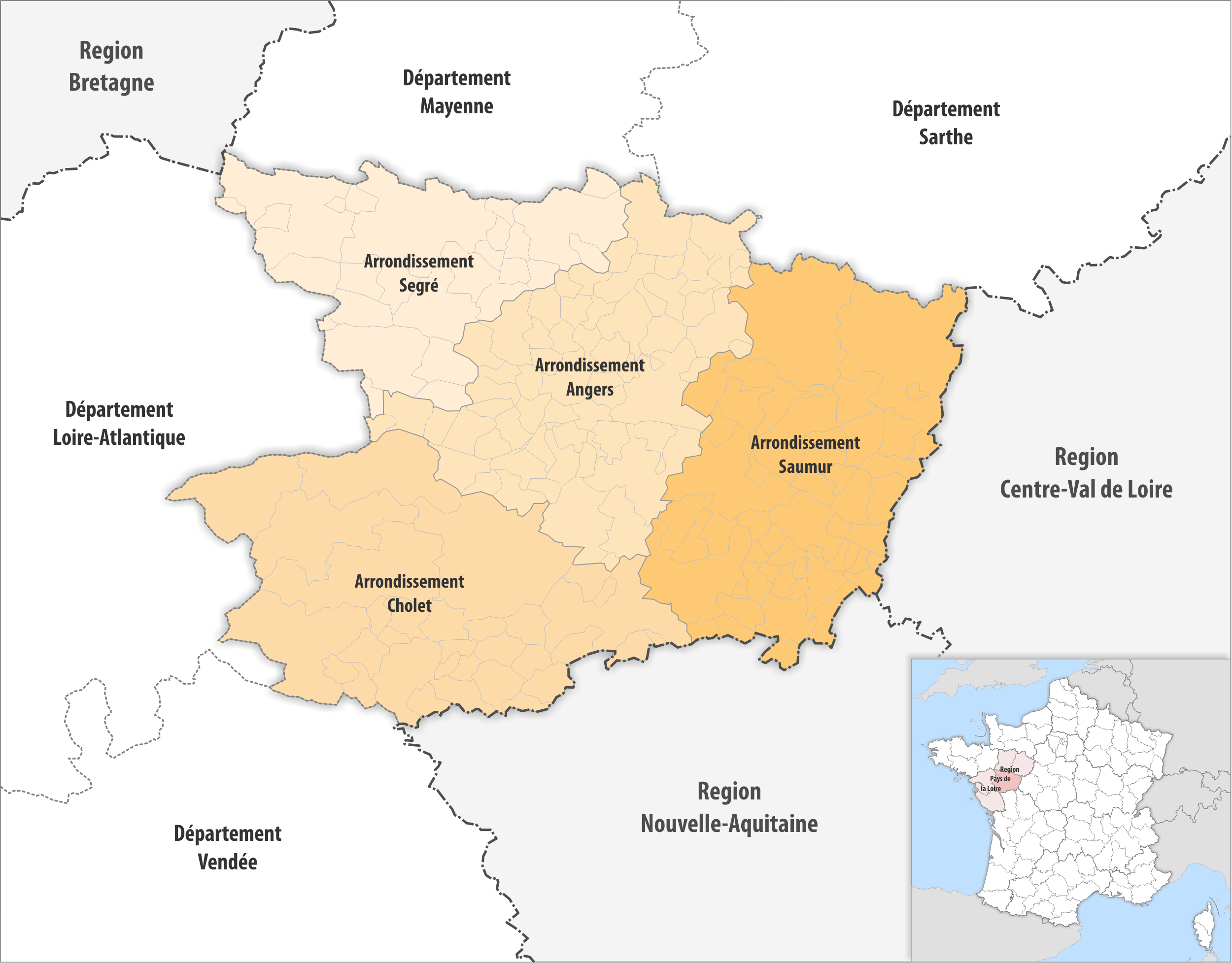 Gemeinden und Arrondissemente im Departement Maine-et-Loire